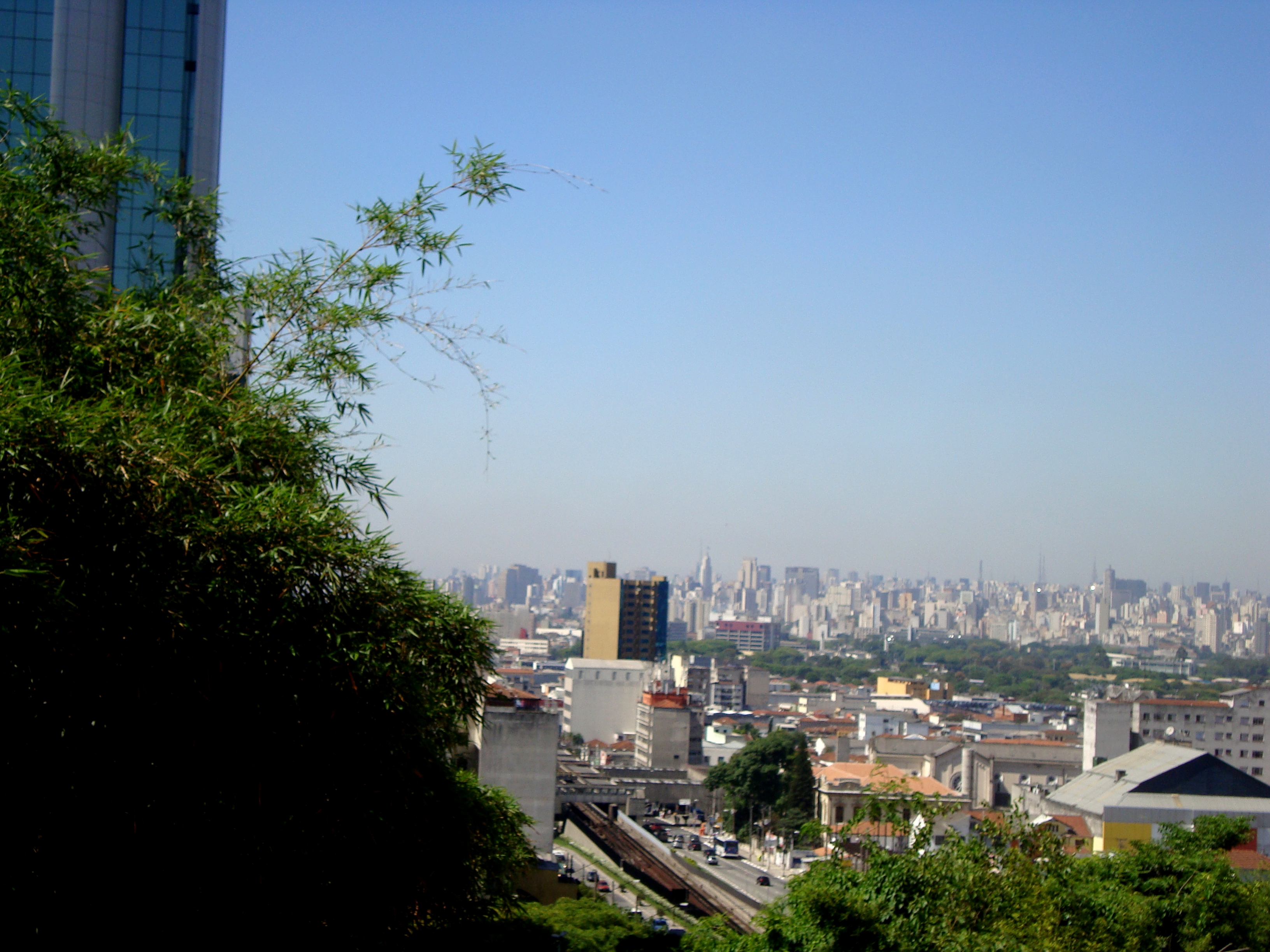 Vista do centro do bairro de Santana, do Alto de Santana.